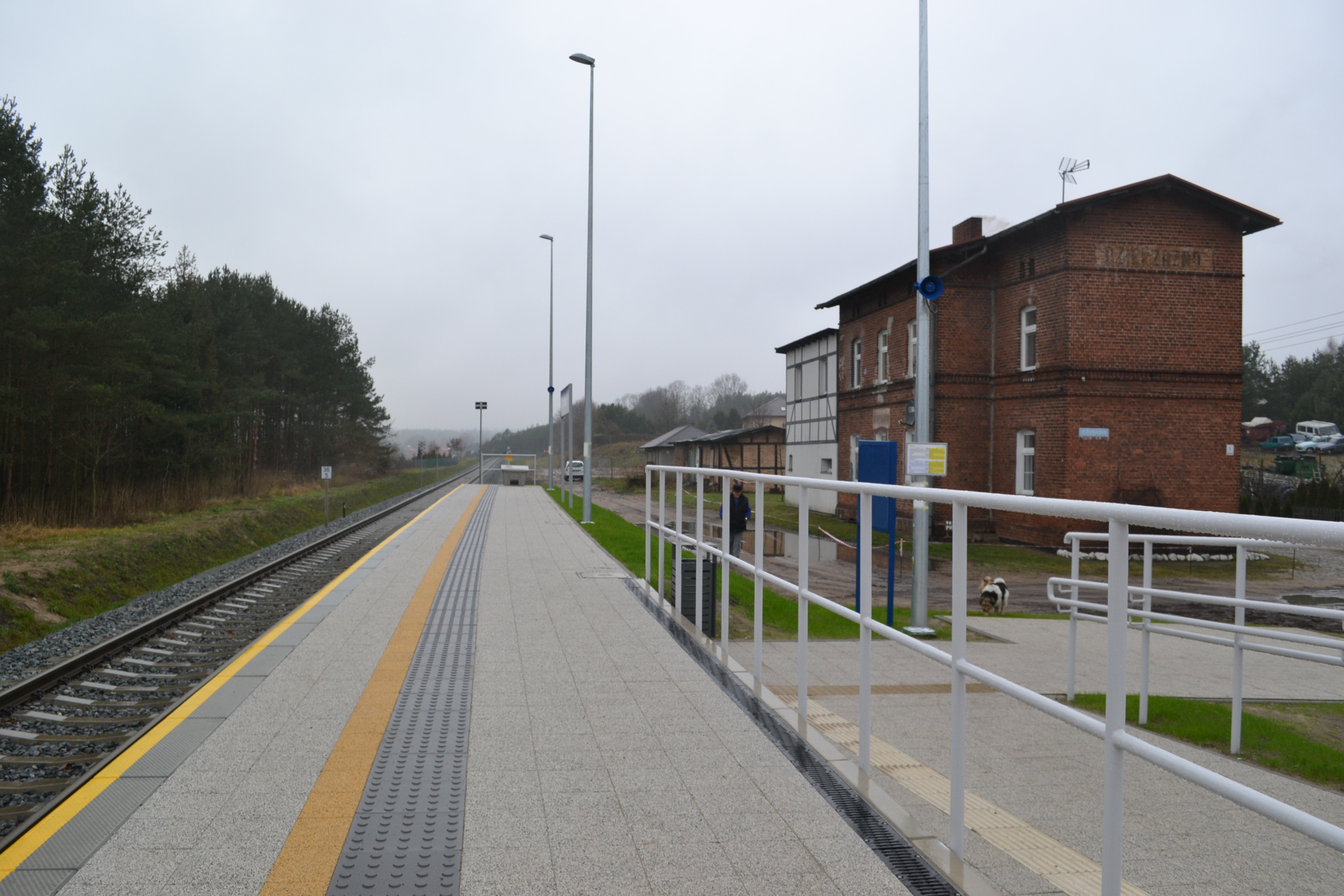 budynek dworca i peron w Dzierżążnie